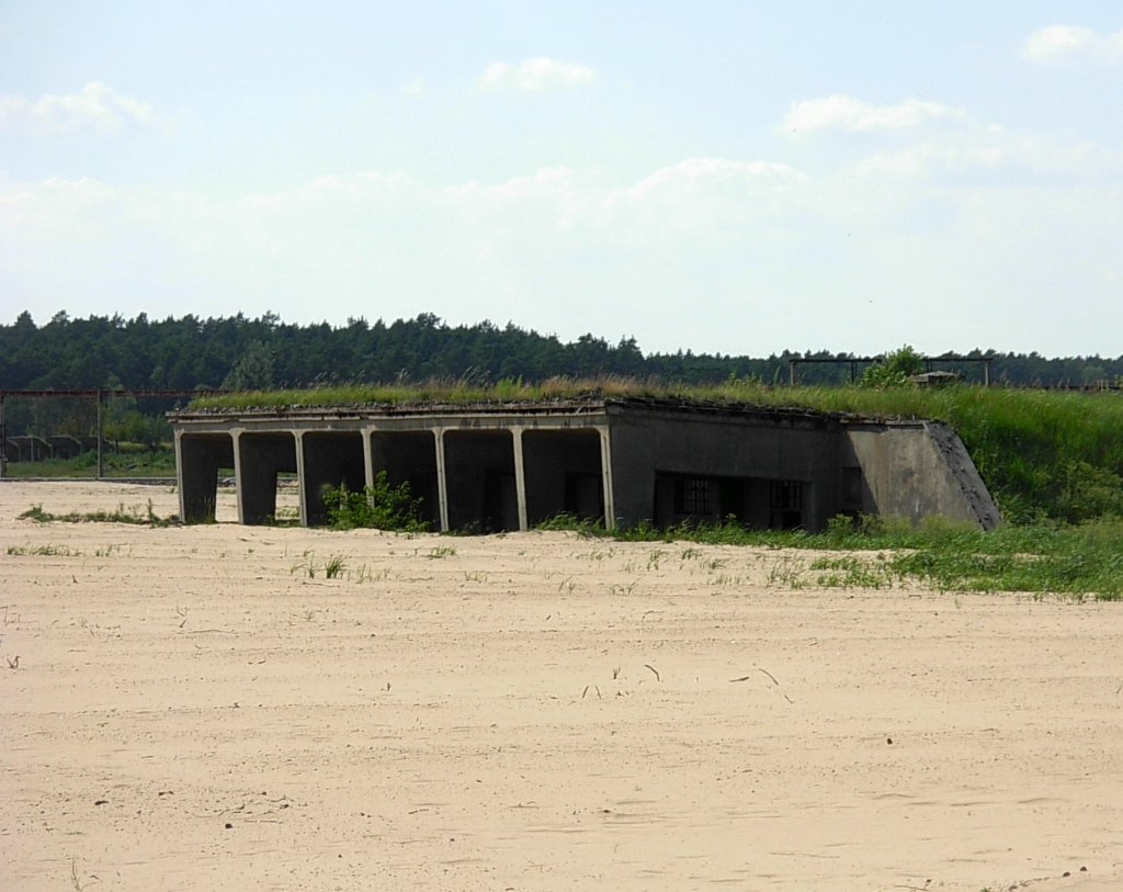 Pozostałości po DAG Fabrik Bromberg